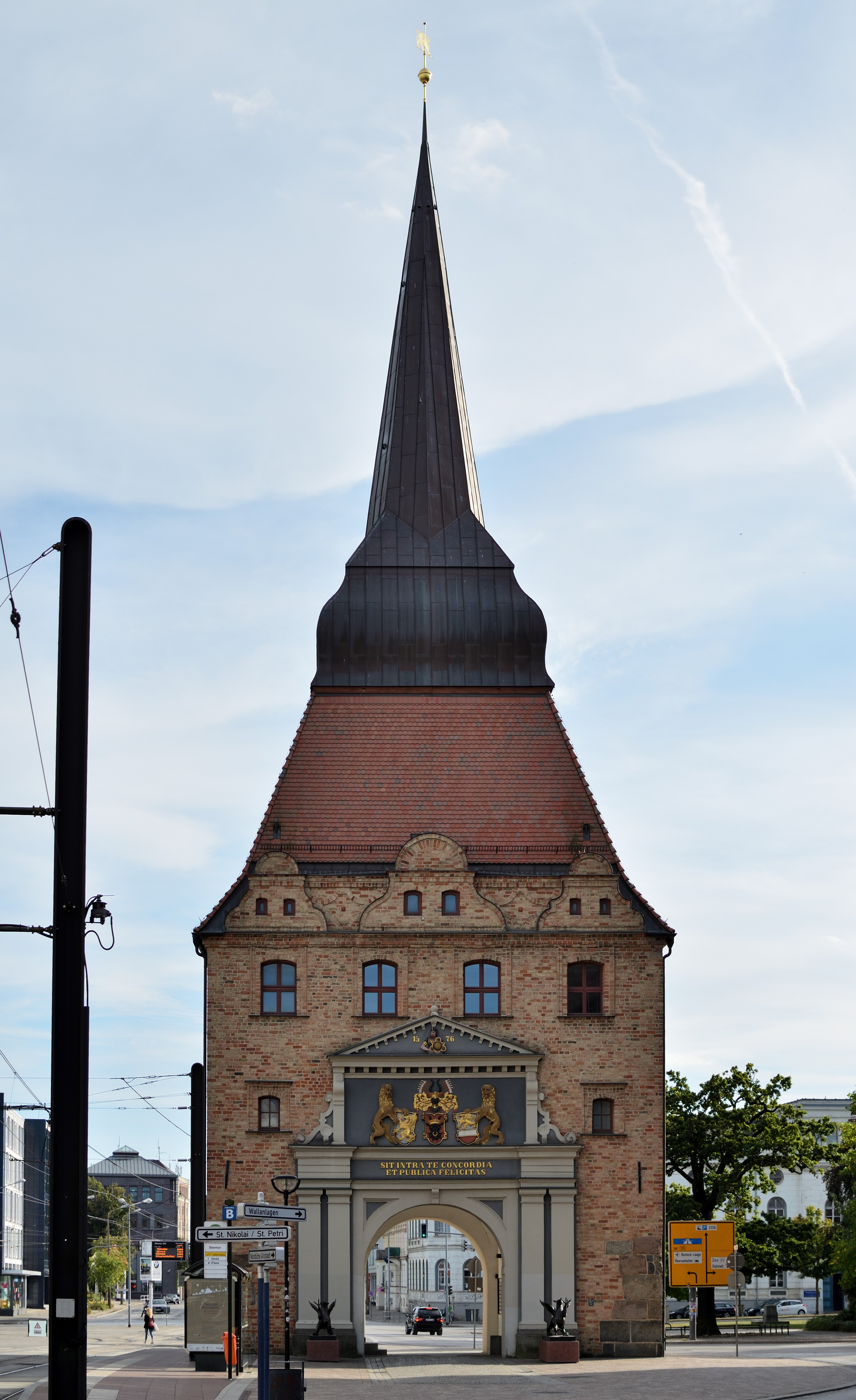 Rostocker Steintor (2016)